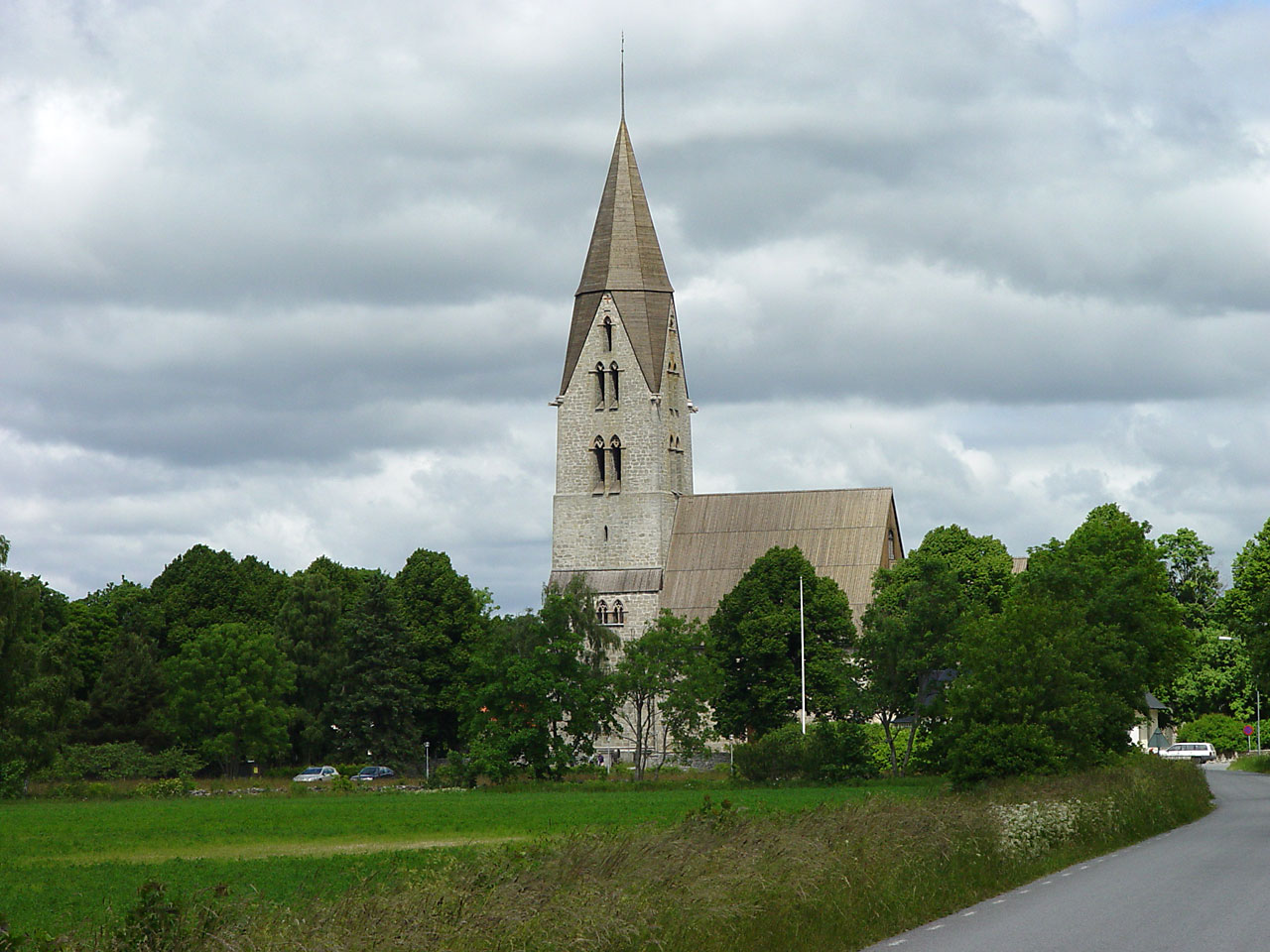 Öja kyrka auf Gotland. Turm von 1360 (Höhe 67m), Baumeister Egypticus